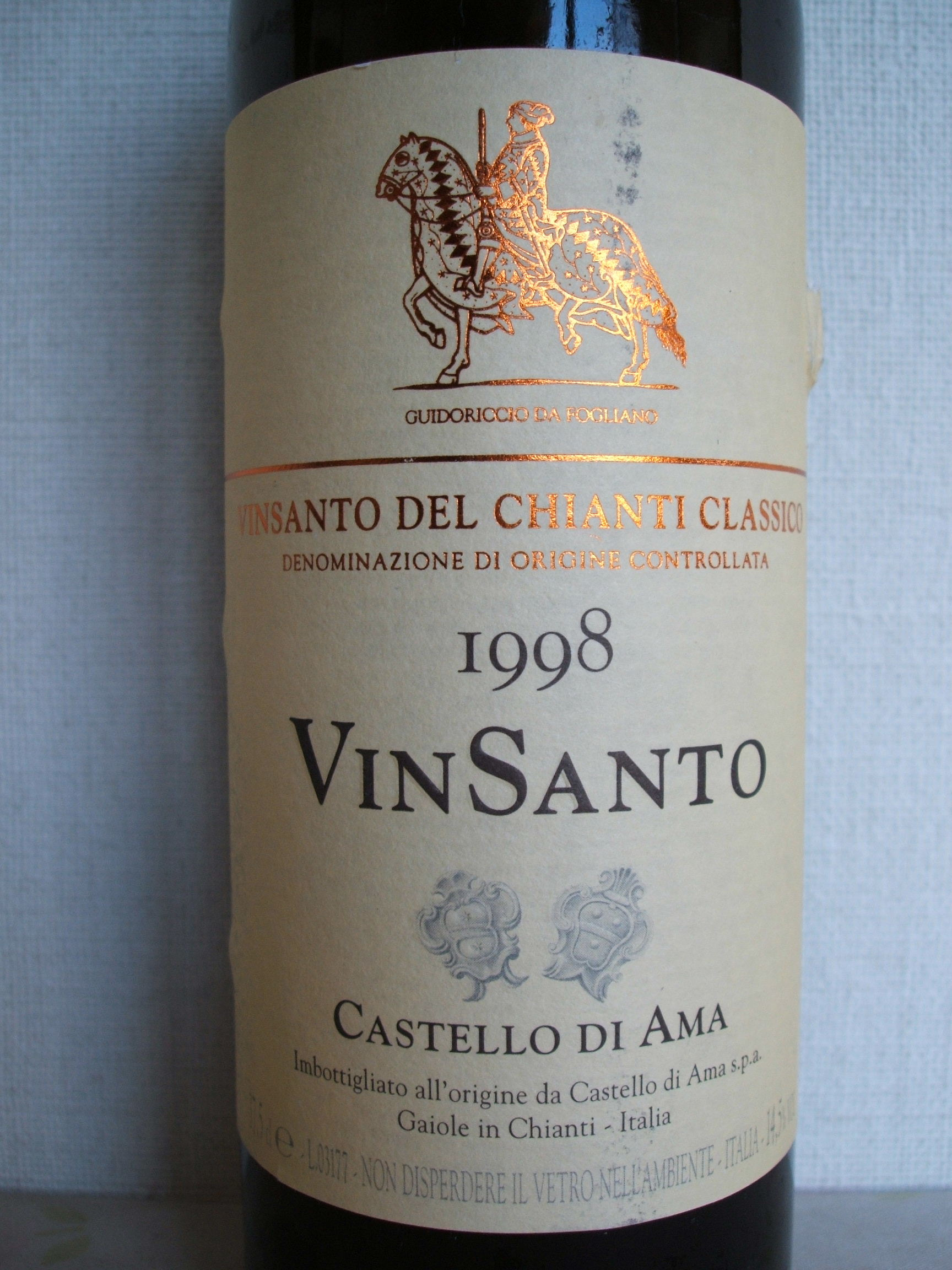 Vin Santo aus der Kellerei Castello di Ama, 1998